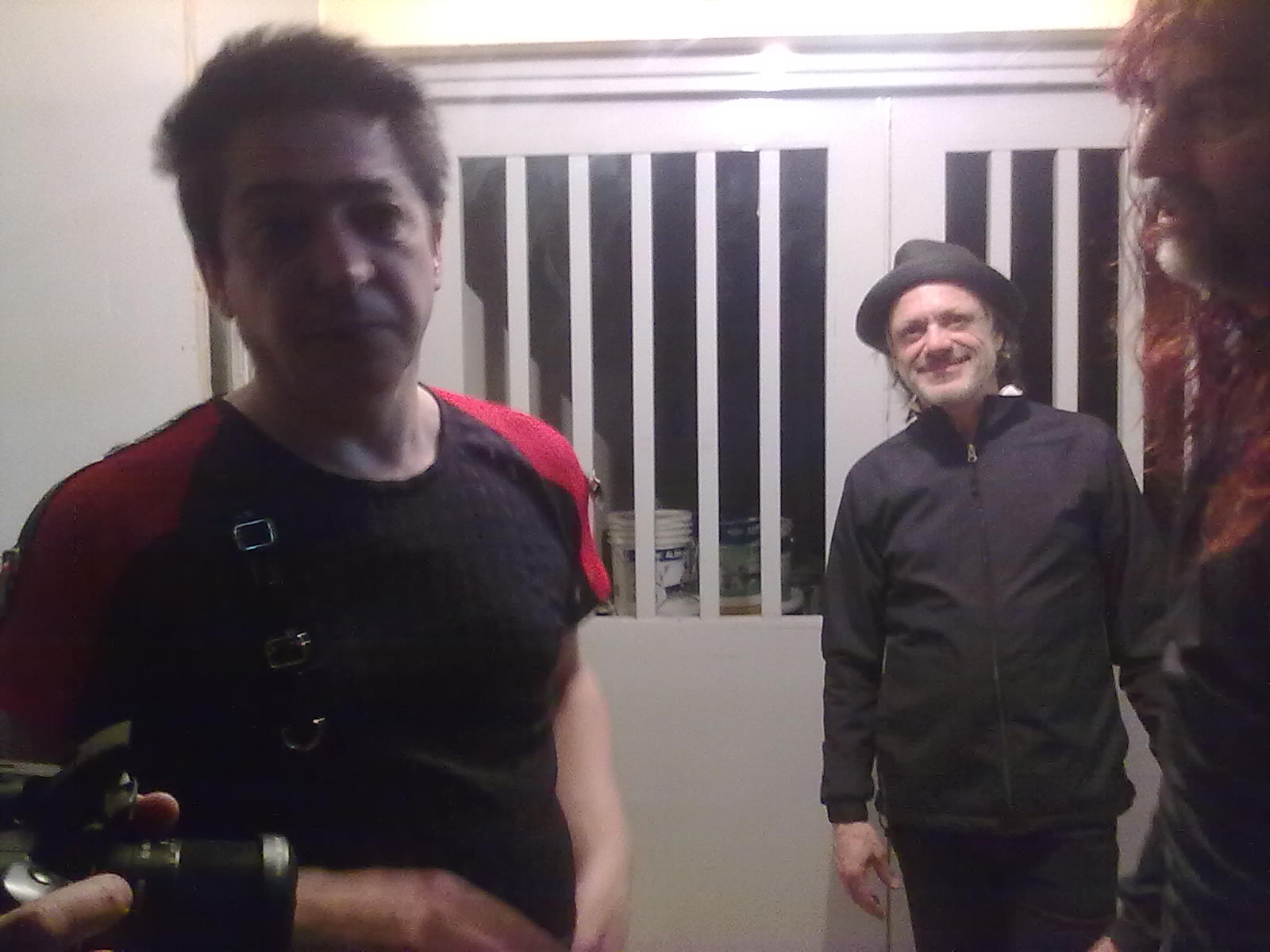 los incasables miembros de virus en una gira en comodoro